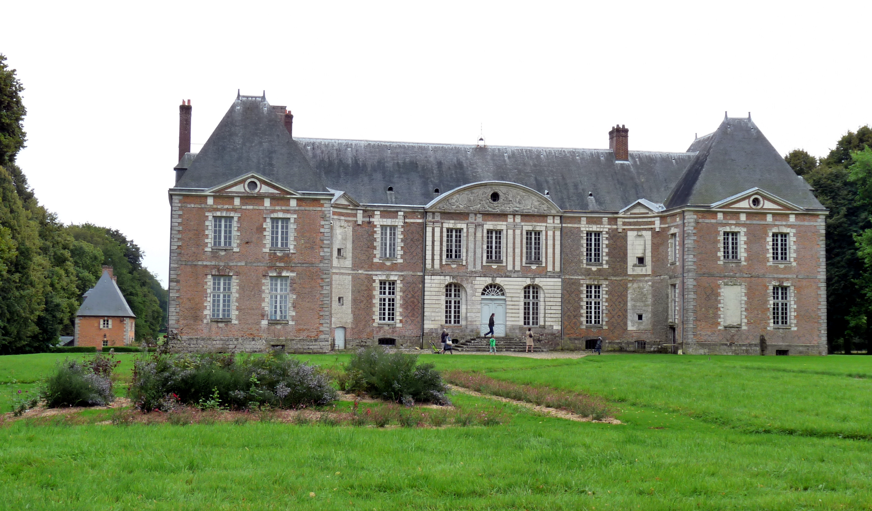 Château de Bosmelet (InscritClasséInscrit) .